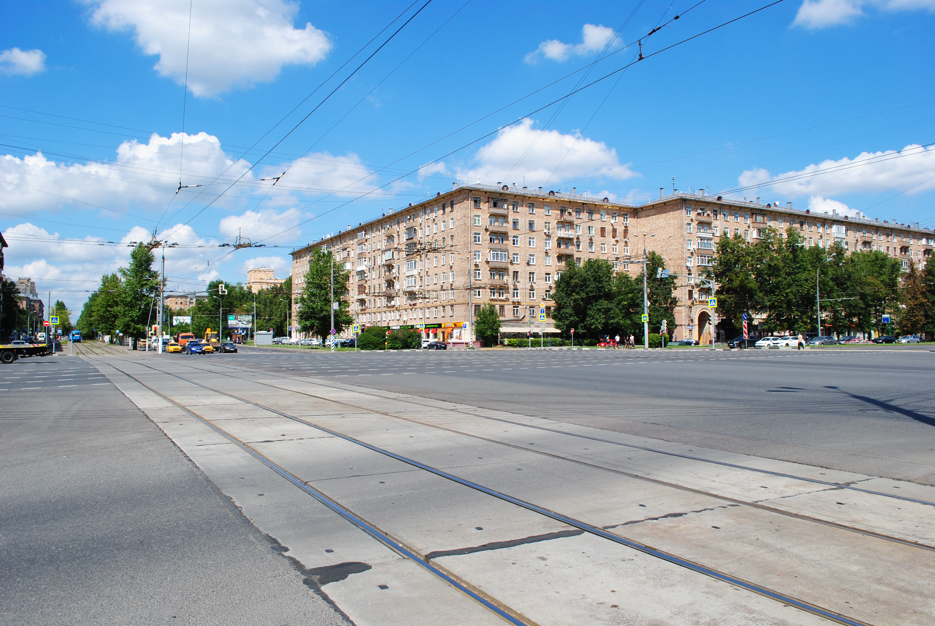 Площадь 60-летия СССР (вид на северную сторону площади и Ломоносовский проспект)